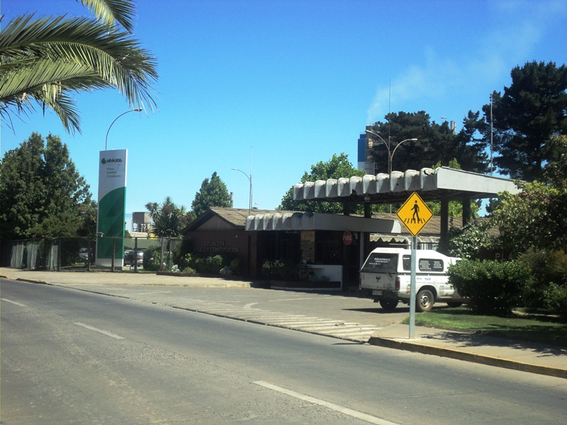 Entrada a la fábrica papelera Celulosa Arauco y Constitución (CELCO) en la ciudad de Constitución (Chile)